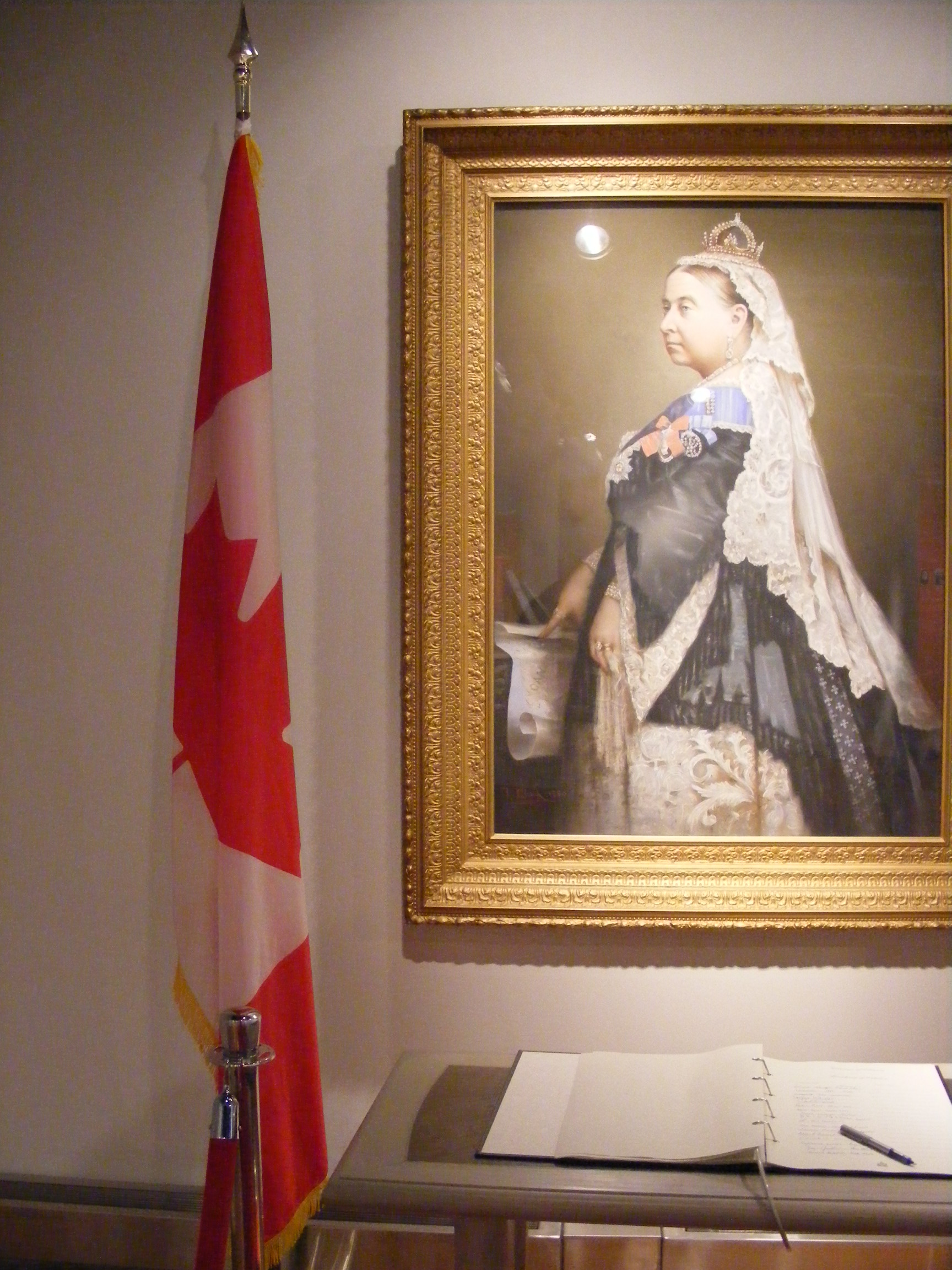 Photo de la reine victoria dans Hôtel de ville d'Ottawa, la Capitale Nationale du Canada.